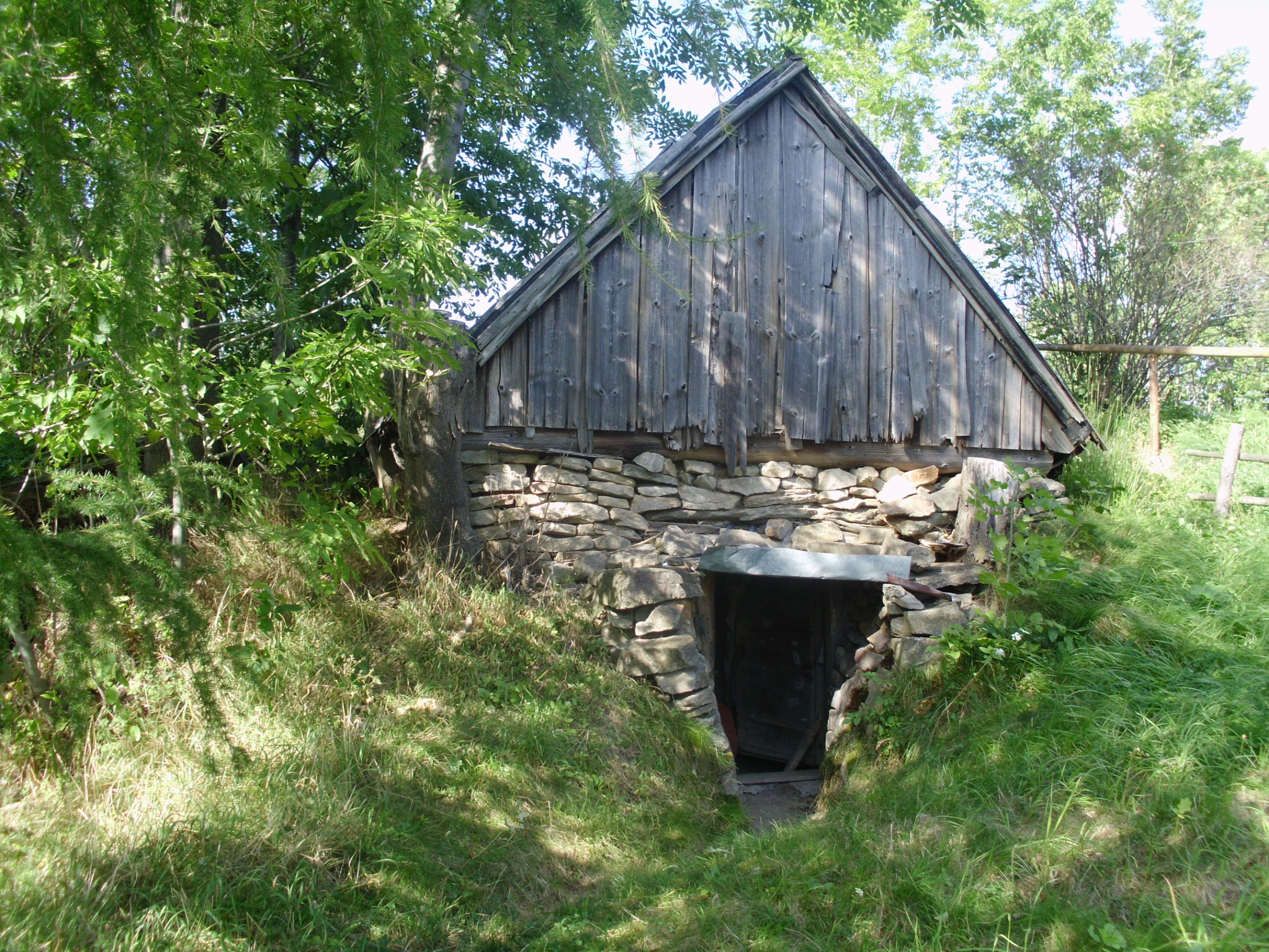 Stara ziemianka (piwniczka) na Suchedli, przysiółek Radziechów.